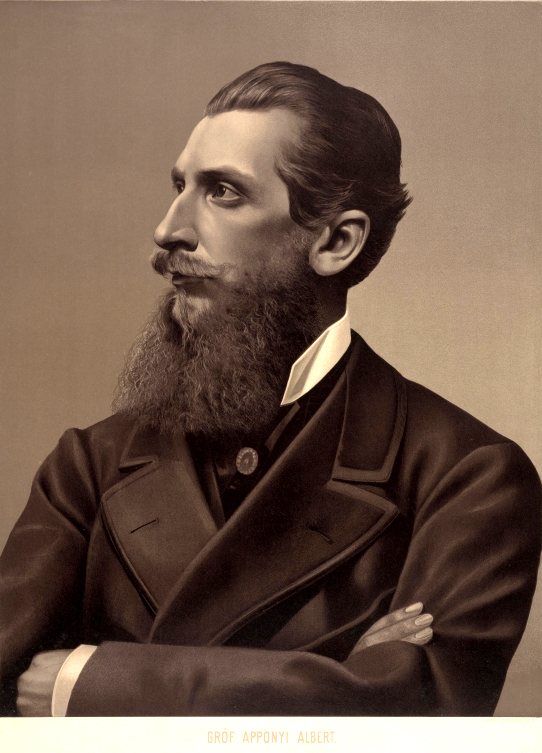 Apponyi-Nagy-Appony, Albert Graf Weitere Titel GRÓF APPONYI ALBERT. Freytag & Berndt Wien Technik Lithografie